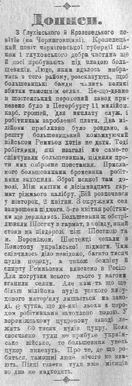 Газета "Нова рада" (Київ), № 53 від 09(27).04(03).1918, стор. 4